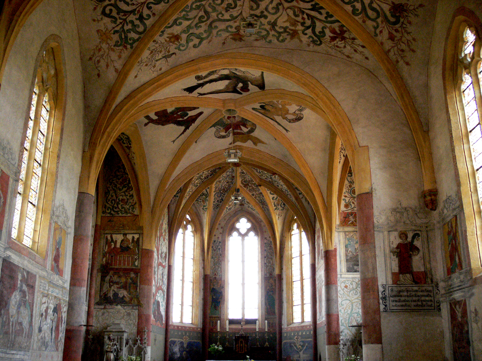 Fresques (XV°-XVI°) de l'église de Sillegny en Moselle, Lorraine, FRANCE